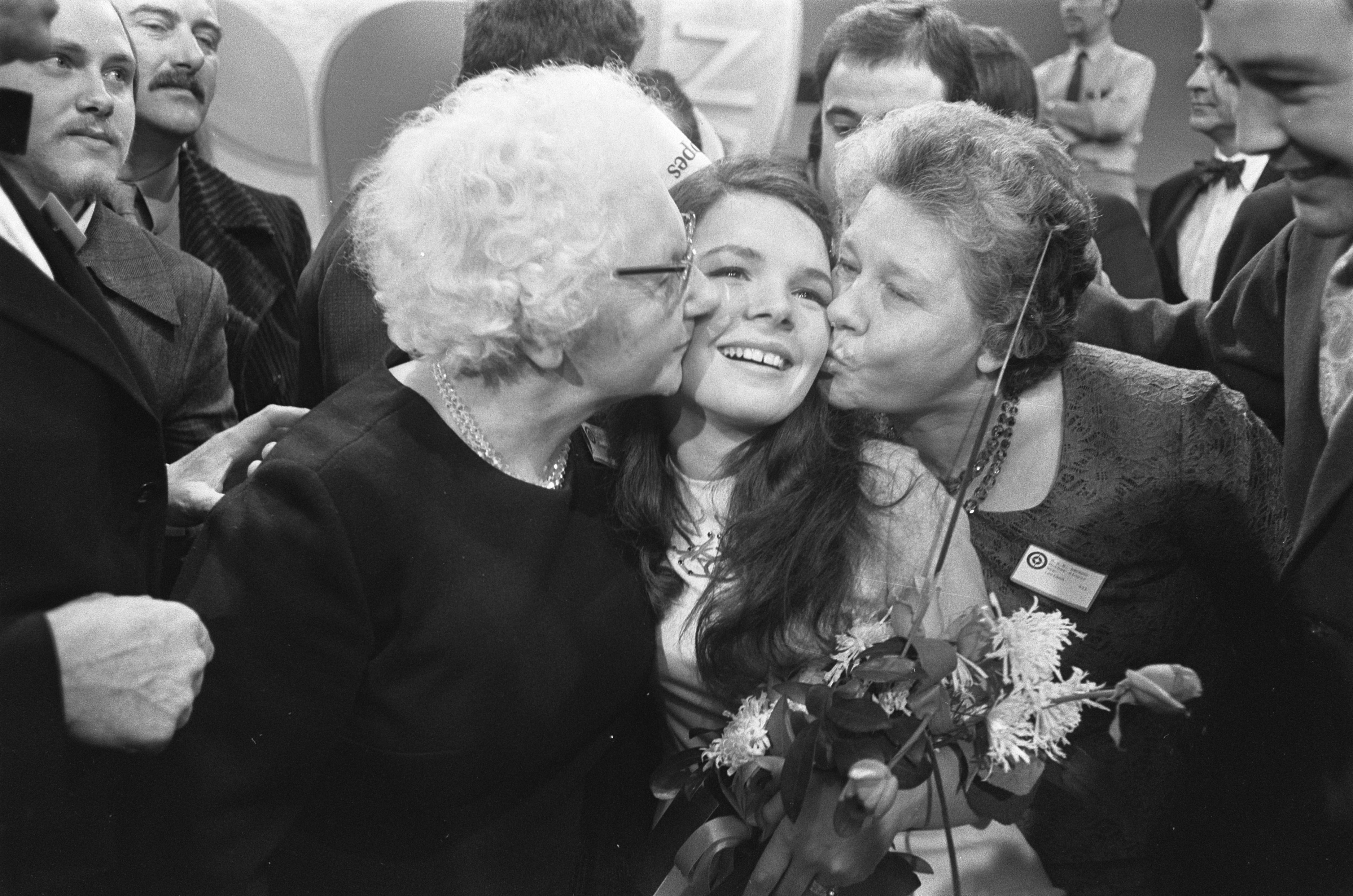 Collectie / Archief : Fotocollectie Anefo Reportage / Serie : Eurovisie Songfestival 1970 in RAI te Amsterdam Beschrijving : Winnares Dana wordt gefeliciteerd door (rechts) moeder en grootmoeder Annotatie : Volledige naam: Dana Rosemary Scallon. Datum : 21 maart 1970 Locatie : Amsterdam, Noord-Holland Trefwoorden : artiesten, songfestivals, zangers Persoonsnaam : Dana (zangeres) Instellingsnaam : Eurovisie Song Festival Fotograaf : Koch, Eric / Anefo Auteursrechthebbende : Nationaal Archief Materiaalsoort : Negatief (zwart/wit) Nummer archiefinventaris : bekijk toegang 2.24.01.05 Bestanddeelnummer : 923-3691